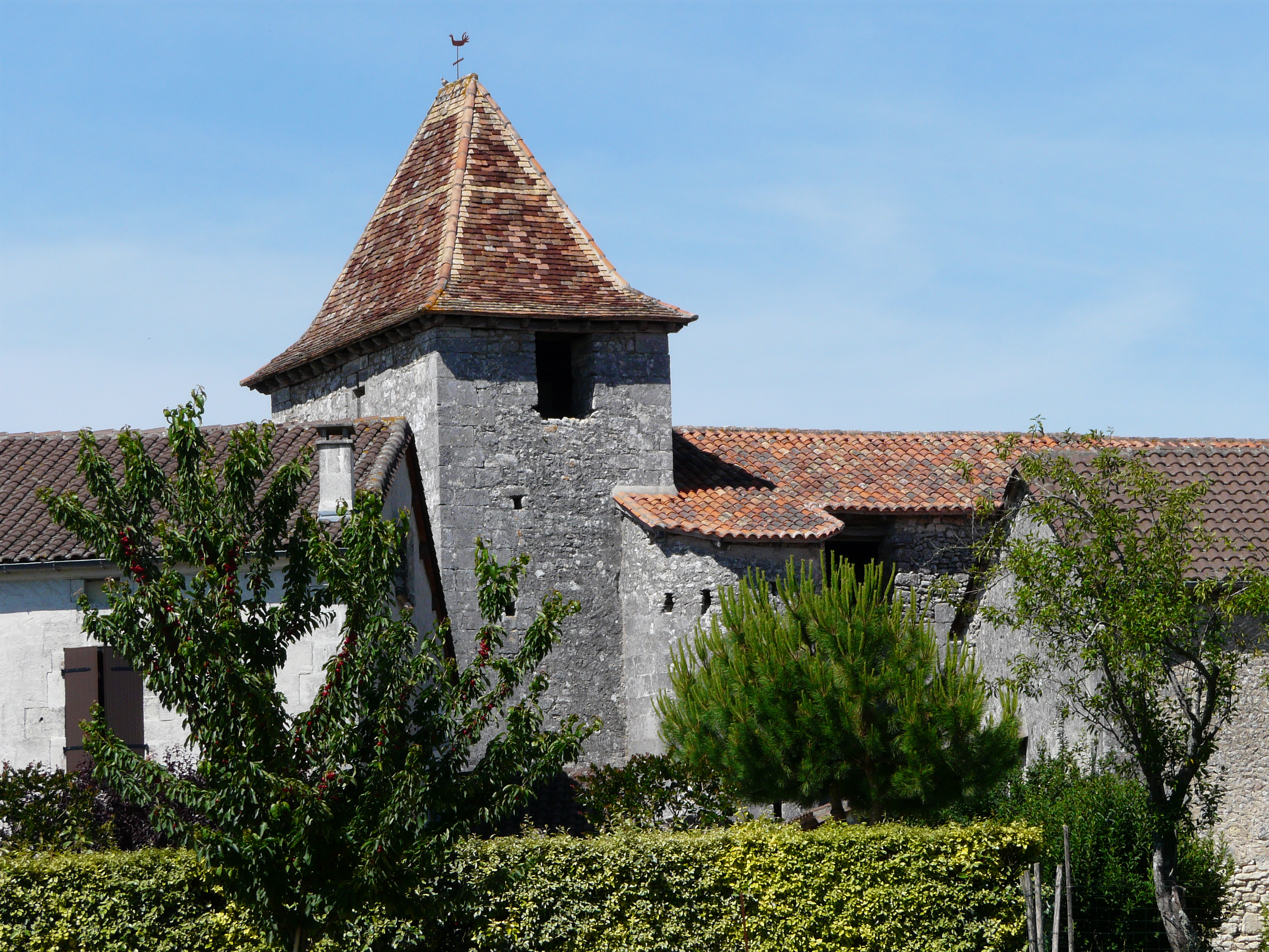 L'église Saint-Barthélemy vue du sud-ouest, La Chapelle-Montabourlet, Dordogne, France.